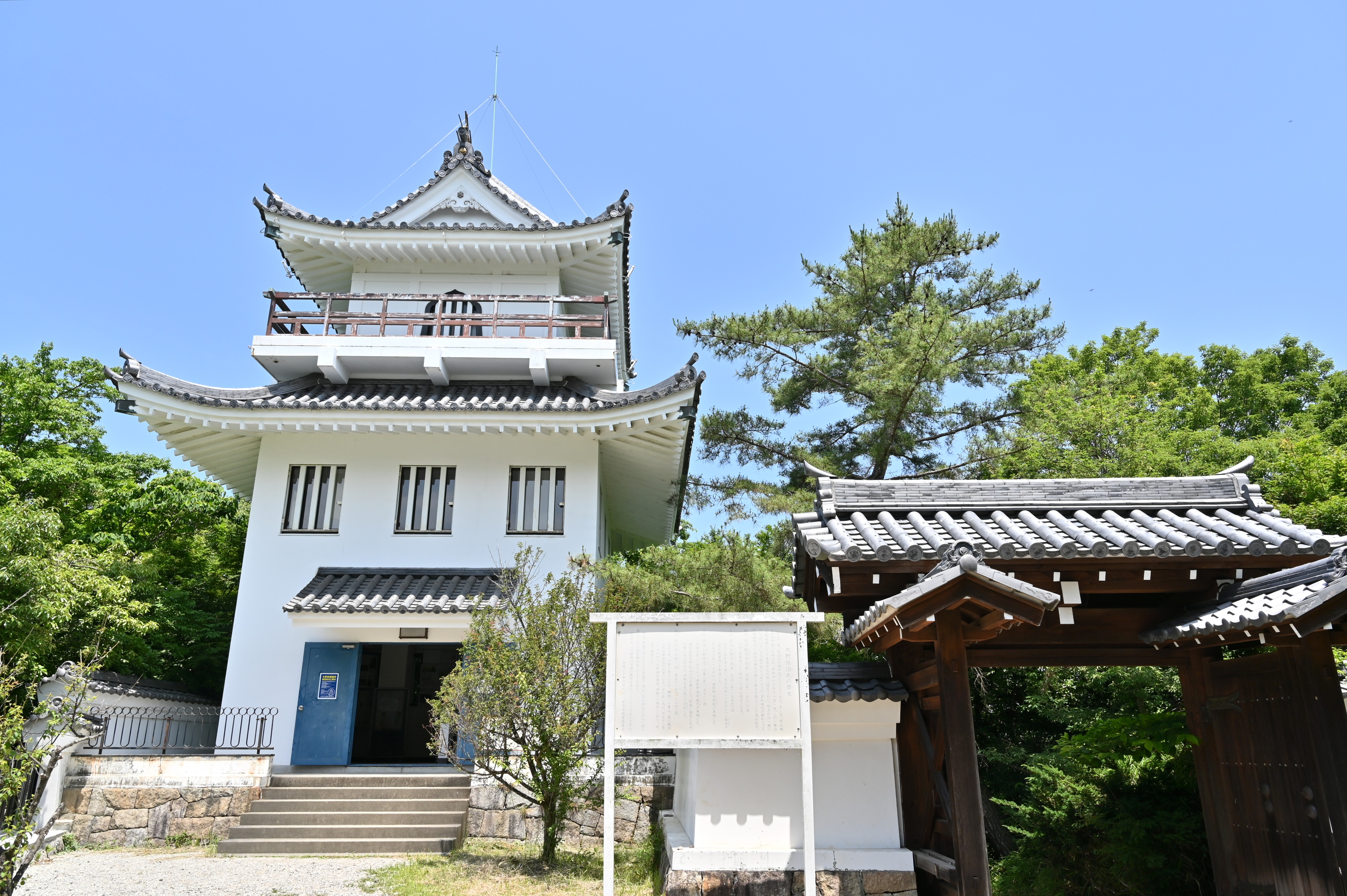 大野城模擬天守 Nikon Z 6